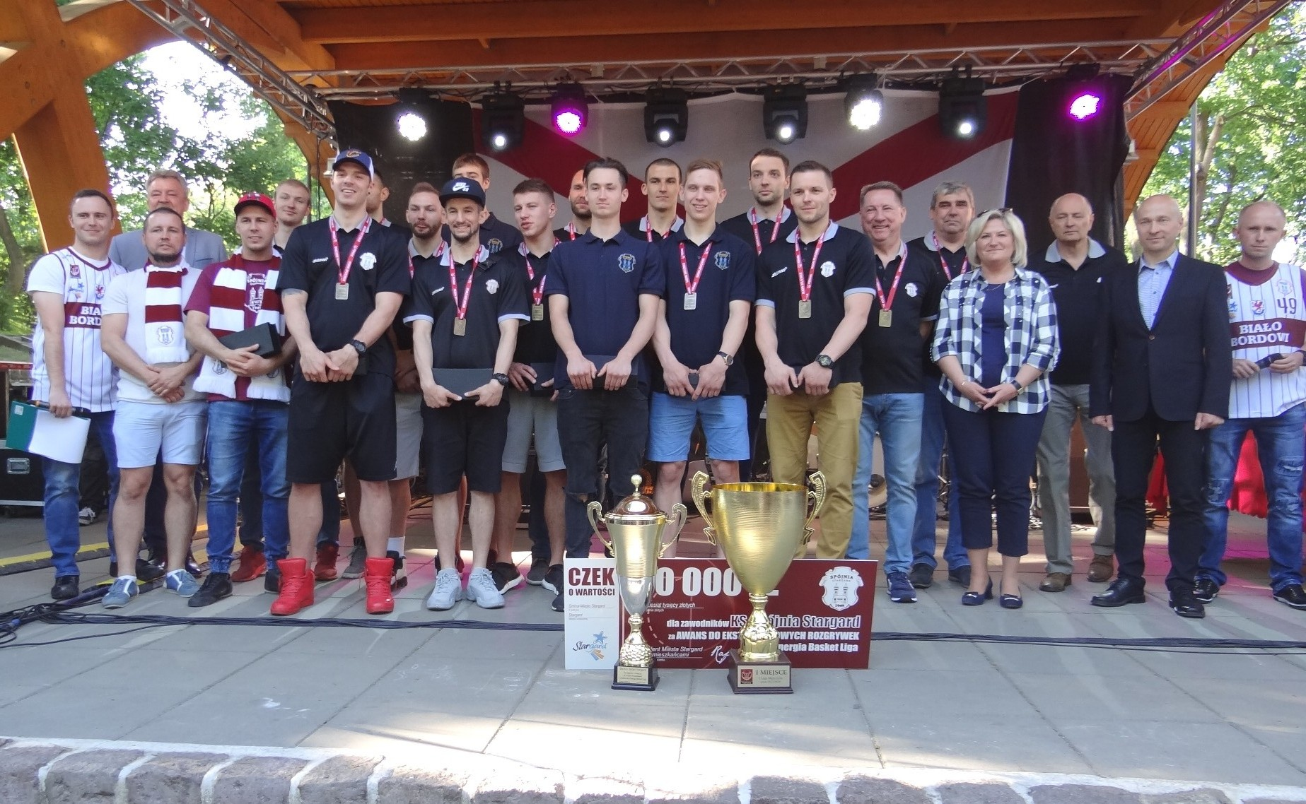 Spójnia Stargard mistrzem I ligi, awans do ekstraklasy (19.05.2019)